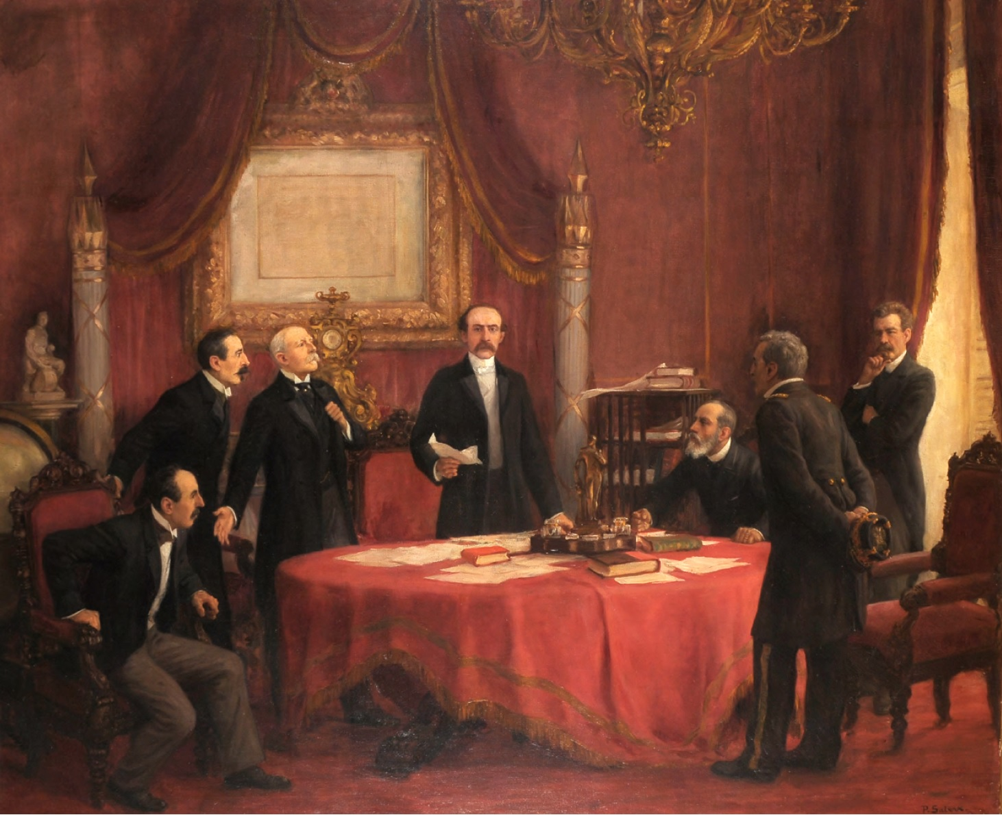 La obra representa al Presidente José Manuel Balmaceda acompañado de sus Ministros Claudio Vicuña, Domingo Godoy, Álvaro Casanova Barros y José Francisco Gana y Allendes. La escena corresponde a un consejo de ministros reunidos en el gabinete presidencial en el Palacio de la Moneda, reconocible por la declaración de la independencia que figura en el fondo de la obra, enmarcado entre las columnas republicanas. Tal decoración se mantiene casi inalterable hasta 1973. La obra recrea la mañana del 7 de enero de 1891, cuando se reciben las noticias de la sublevación de la Escuadra.